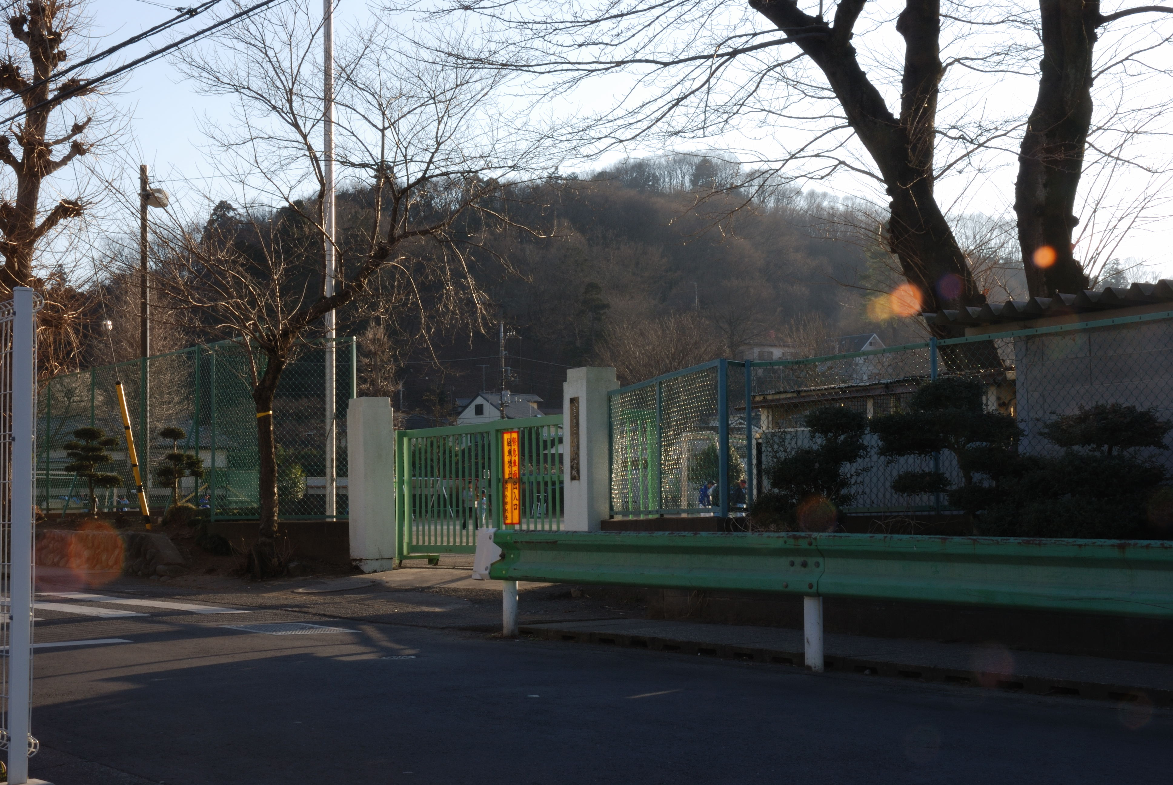 Hatsuzawa Castle